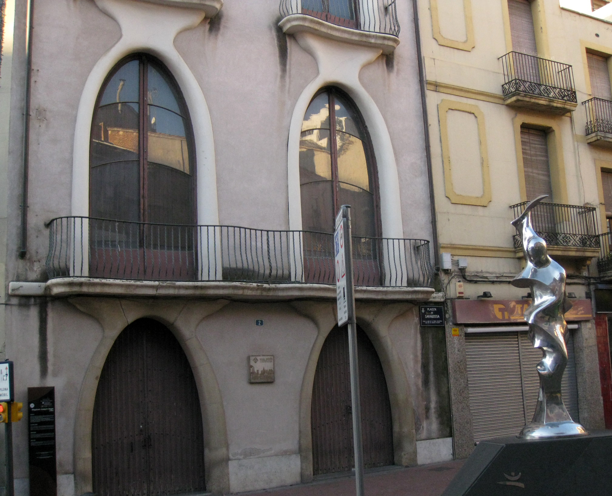 Arxiu Tobella, antic magatzem Farnés, obra de Lluís Muncunill de 1904, a la placeta de Saragossa núm. 2 (Terrassa). Al davant s'hi pot veure l'escultura Flama, de Ferran Bach i Esteve.